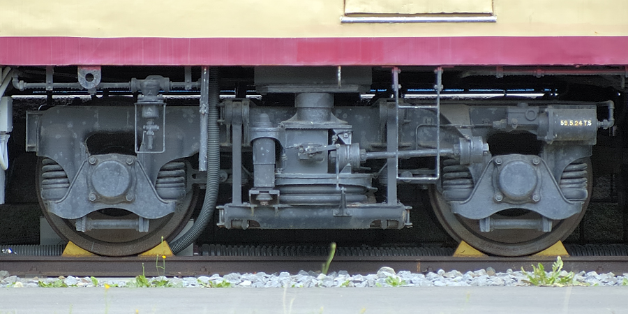 일본국철 키하 80계 디젤 동차의 대차